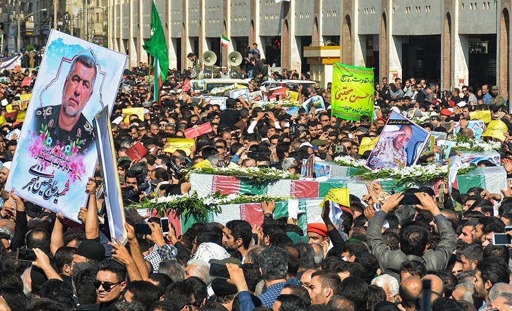 مراسم تشییع شهدای حمله تروریستی اهواز، امروزدوشنبه ۲ مهر ۱۳۹۷ از حسینیه ثارالله اهواز به سمت چهارراه زند و گلزار شهدای بهشت آباد برگزار شد.در این مراسم که ساعت 8:30 دقیقه صبح آغازشد، اقشار مختلف مردم ولایتمدار و شهیدپرور خوزستان با آرمان‌های شهدا و انقلاب اسلامی تجدید میثاق کردند. در حمله تروریستی روز گذشته که در حین رژه نیروهای مسلح در اهواز رخ داد، 24 نفر به شهادت رسیده و 59 نفر مجروح شدند.